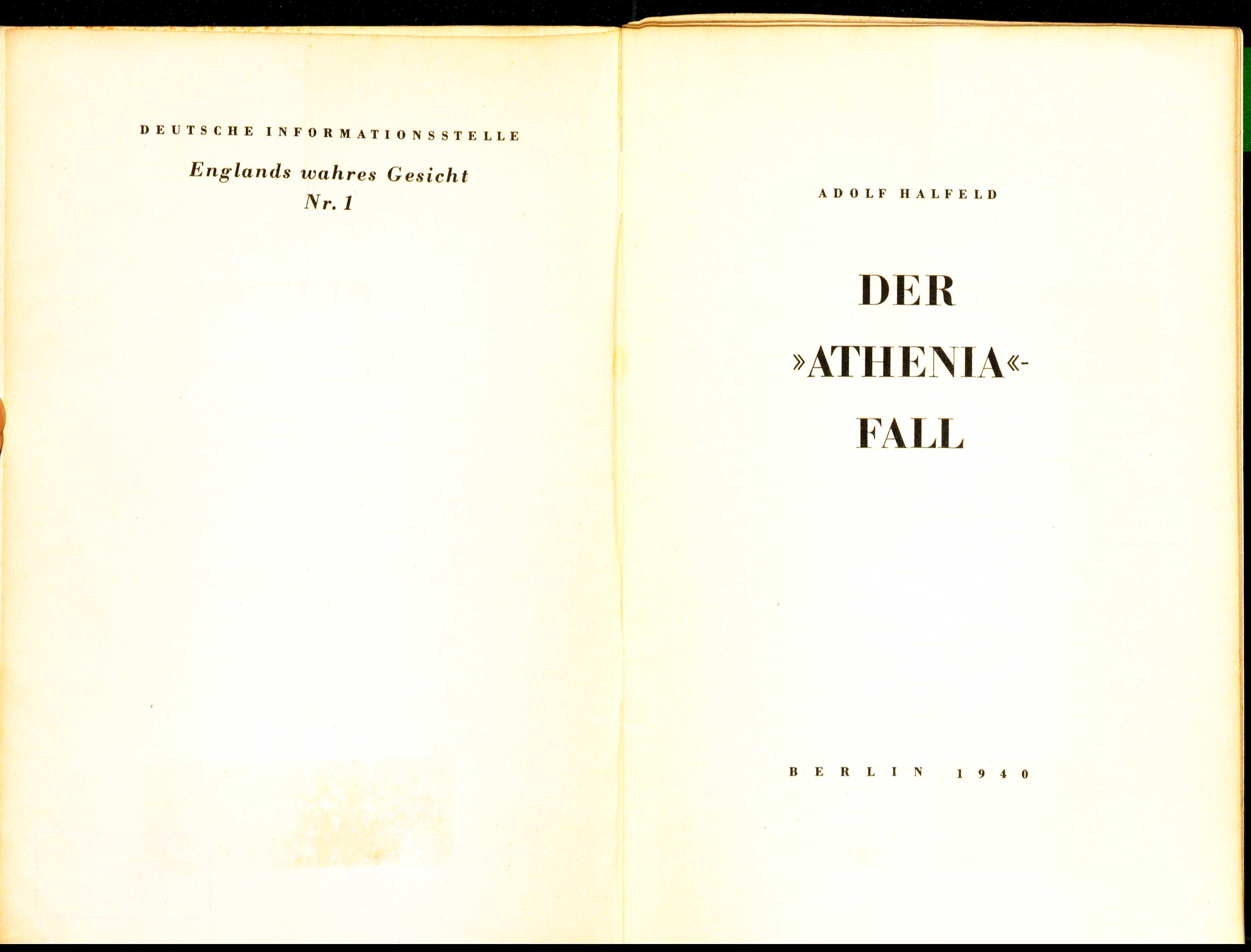 Adolf Halfeld Der "Athenia"-Fall Englands wahres Gesicht. Berlin : Volk und Reich, 1939. hier Auflage 1940. Titel